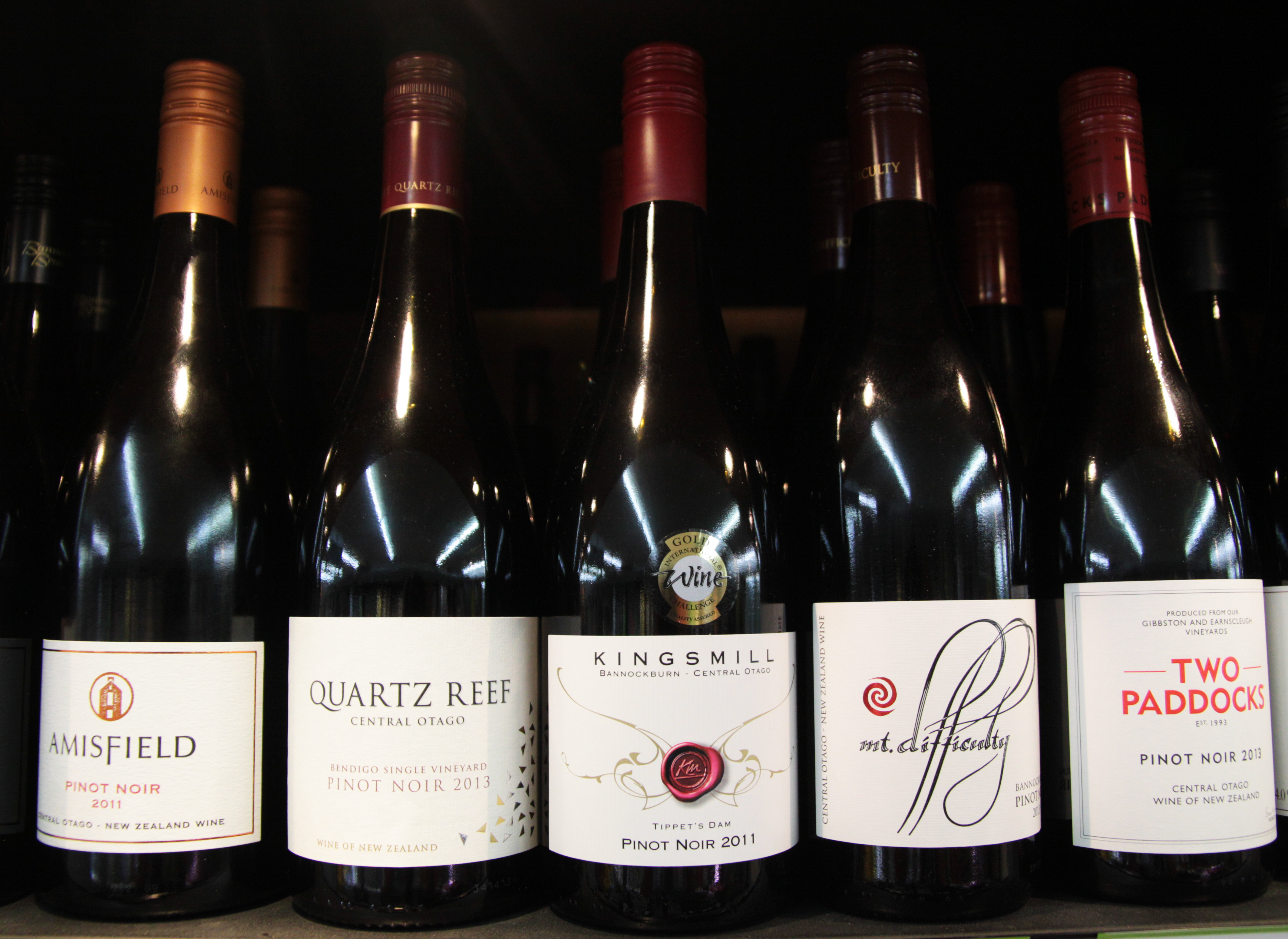 amisfield, quartz reef, king smill, mt difficulty, 2 paddocks